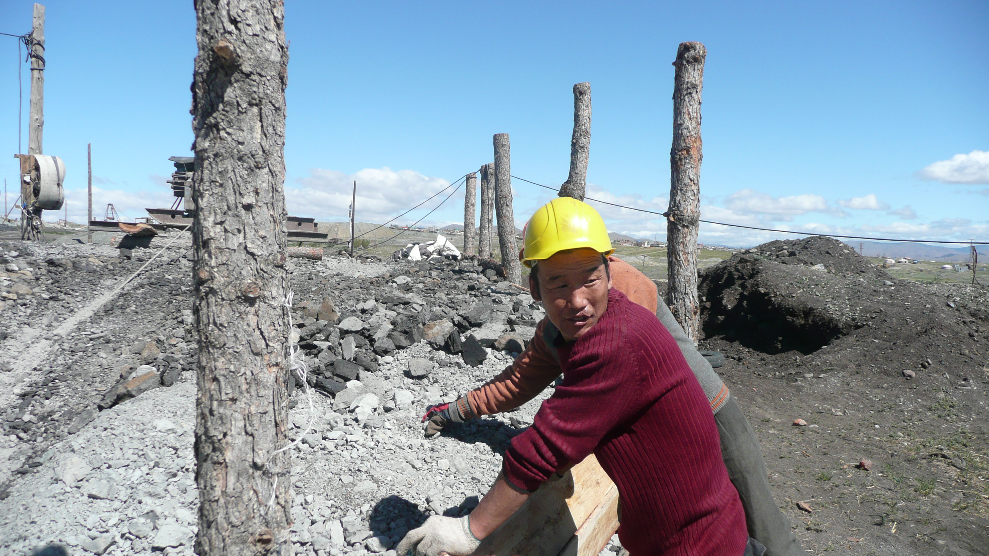 Bergarbeiter in der Bergbaustadt Nalaikh unweit von Ulan Bator